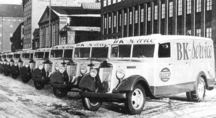 Banan-Kompaniets distributionsbilar ca 1930